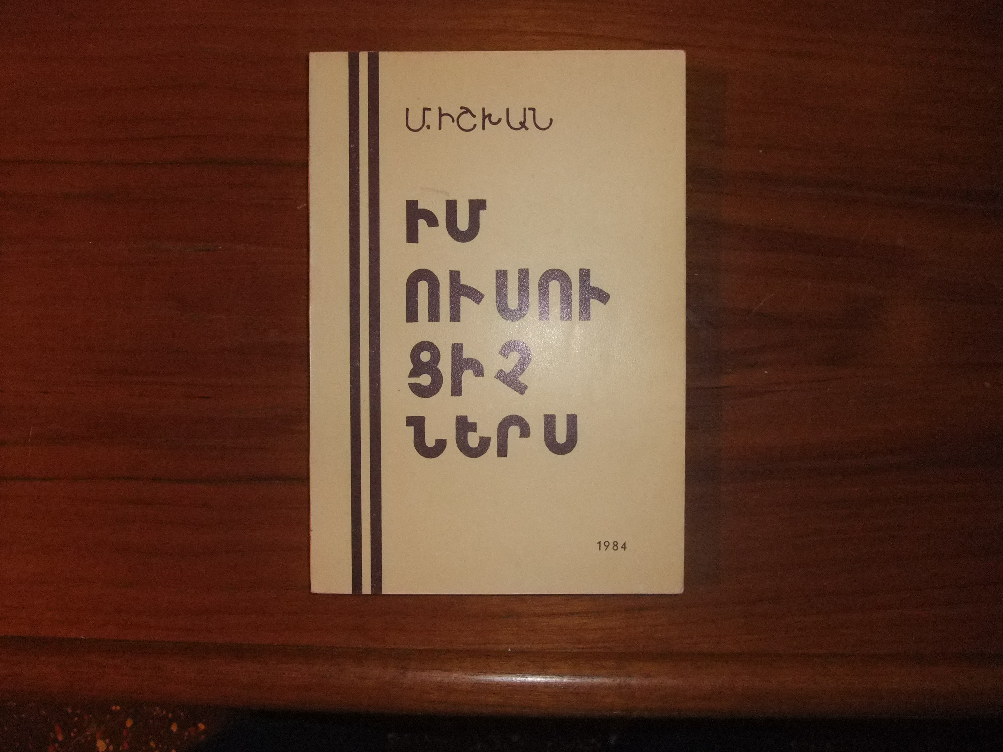 Մուշեղ Իշխան, Իմ Ուսուցիչներս - Պէյրութ 1984